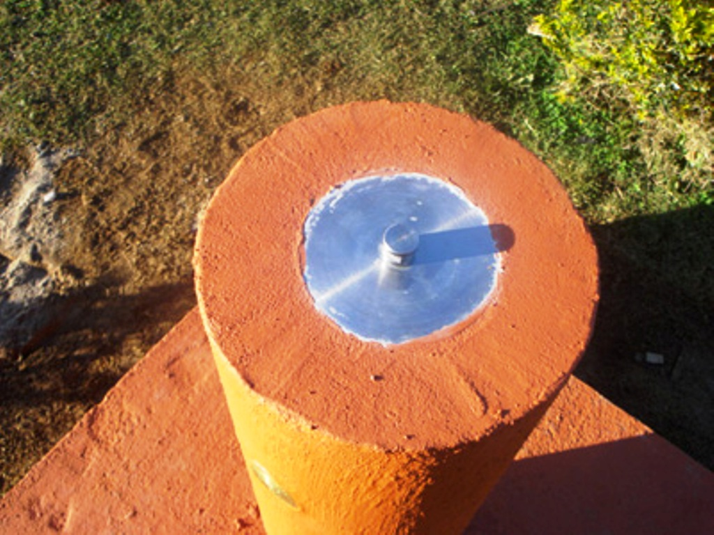 Marco Geodésico da cidade